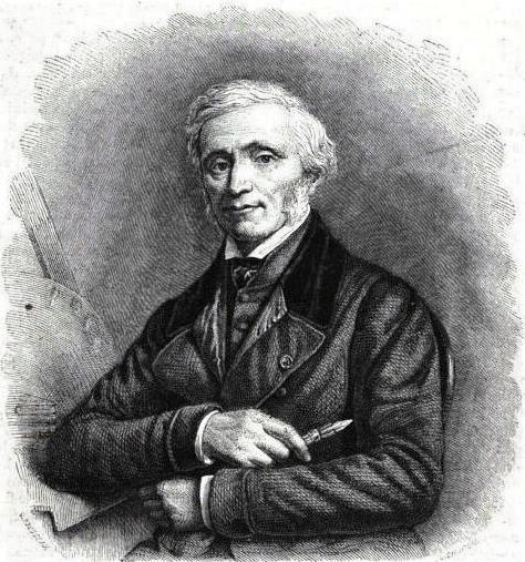 Louis Hersent